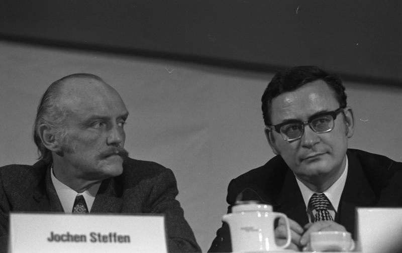 Bundesparteitag der SPD in Hannover (links: Jochen Steffen, rechts: Klaus Schütz) 10.-14.4.1973